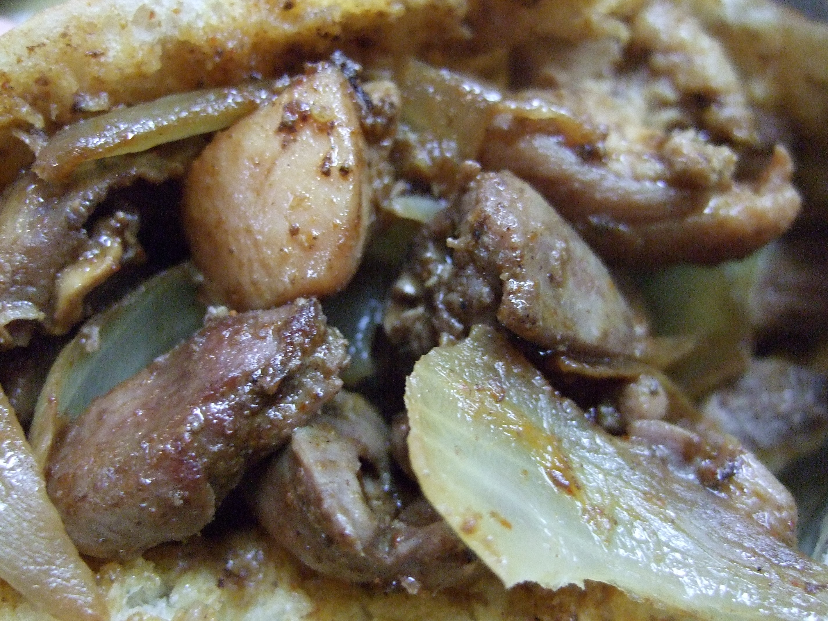 jerusalem mix